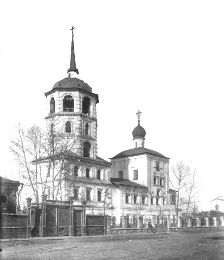 Иркутск. Спасская Церковь.